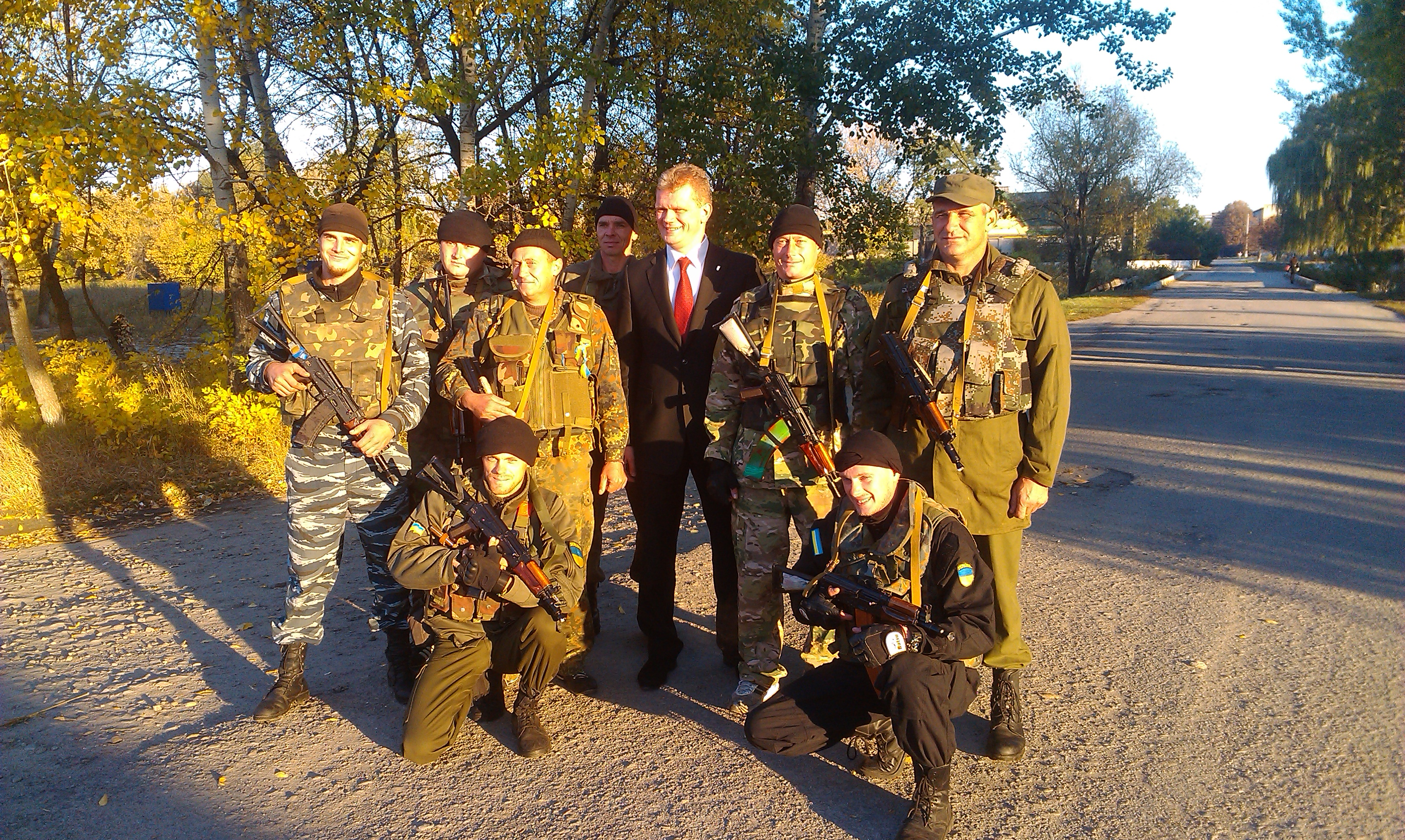 Зустріч вояків з Лутугіно з міністром АПК Ігорем Швайкою, який теж родом з Лутугіно